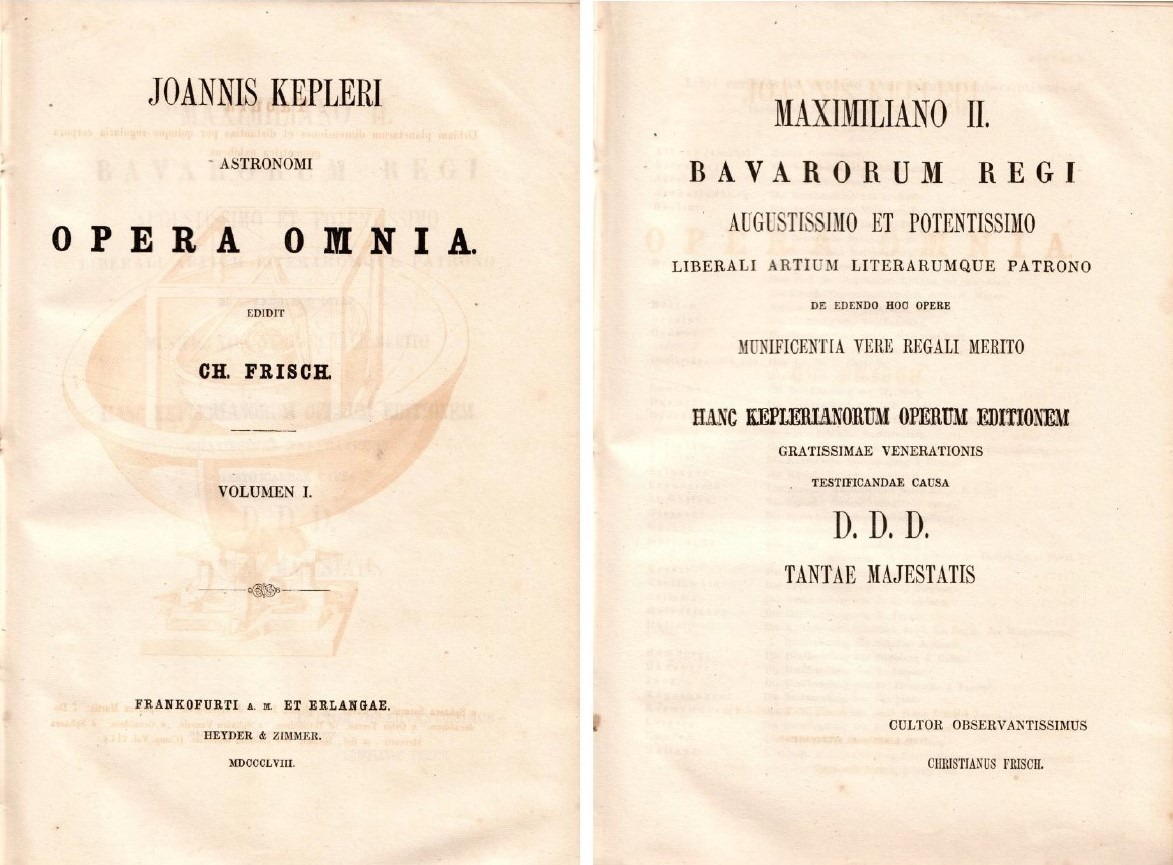 Titel Vol. 1 + Widmung für Maximilian II.